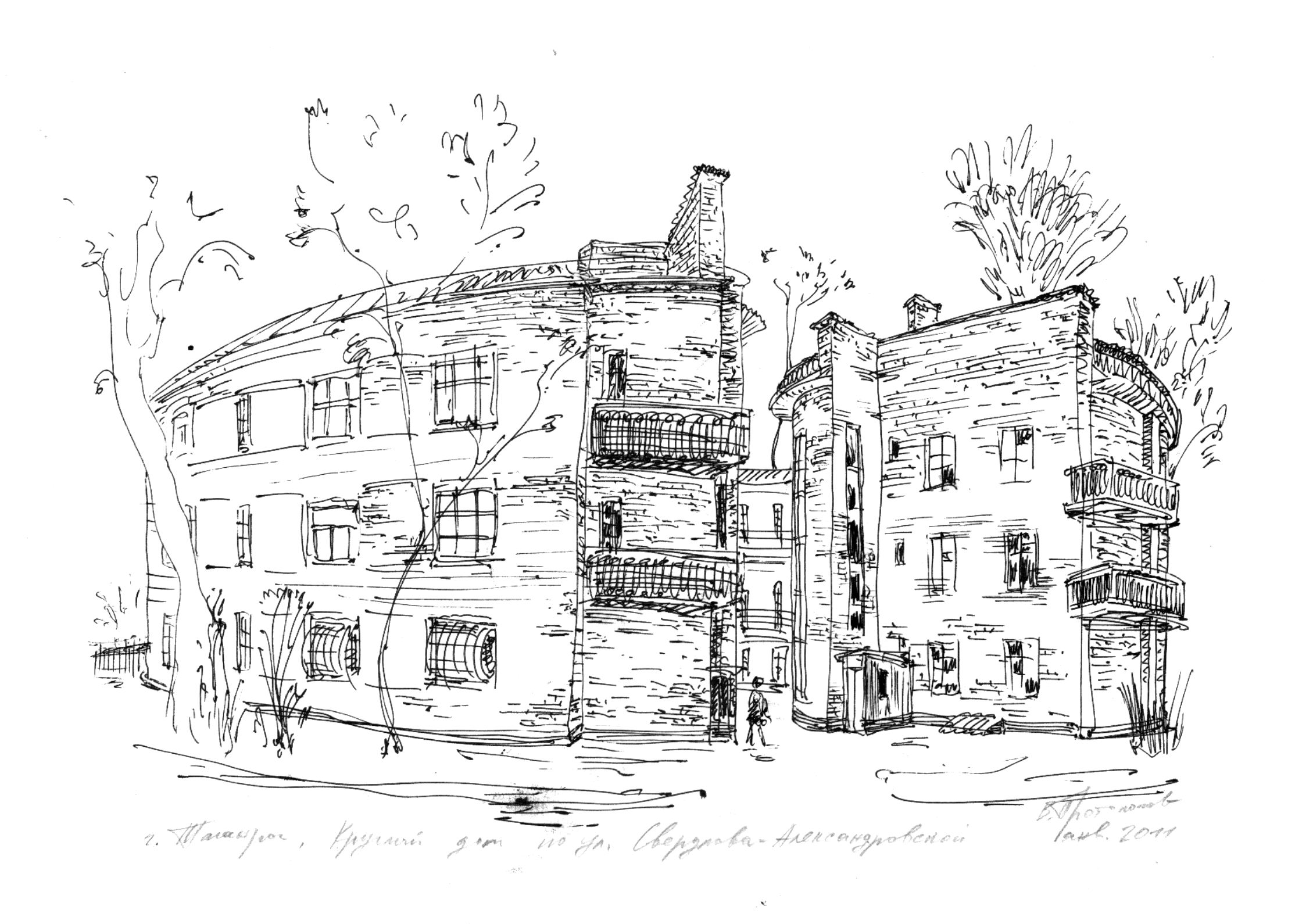 "Круглый дом", Таганрог. Автор — Владислав Протопопов. Картон, тушь. 2011.